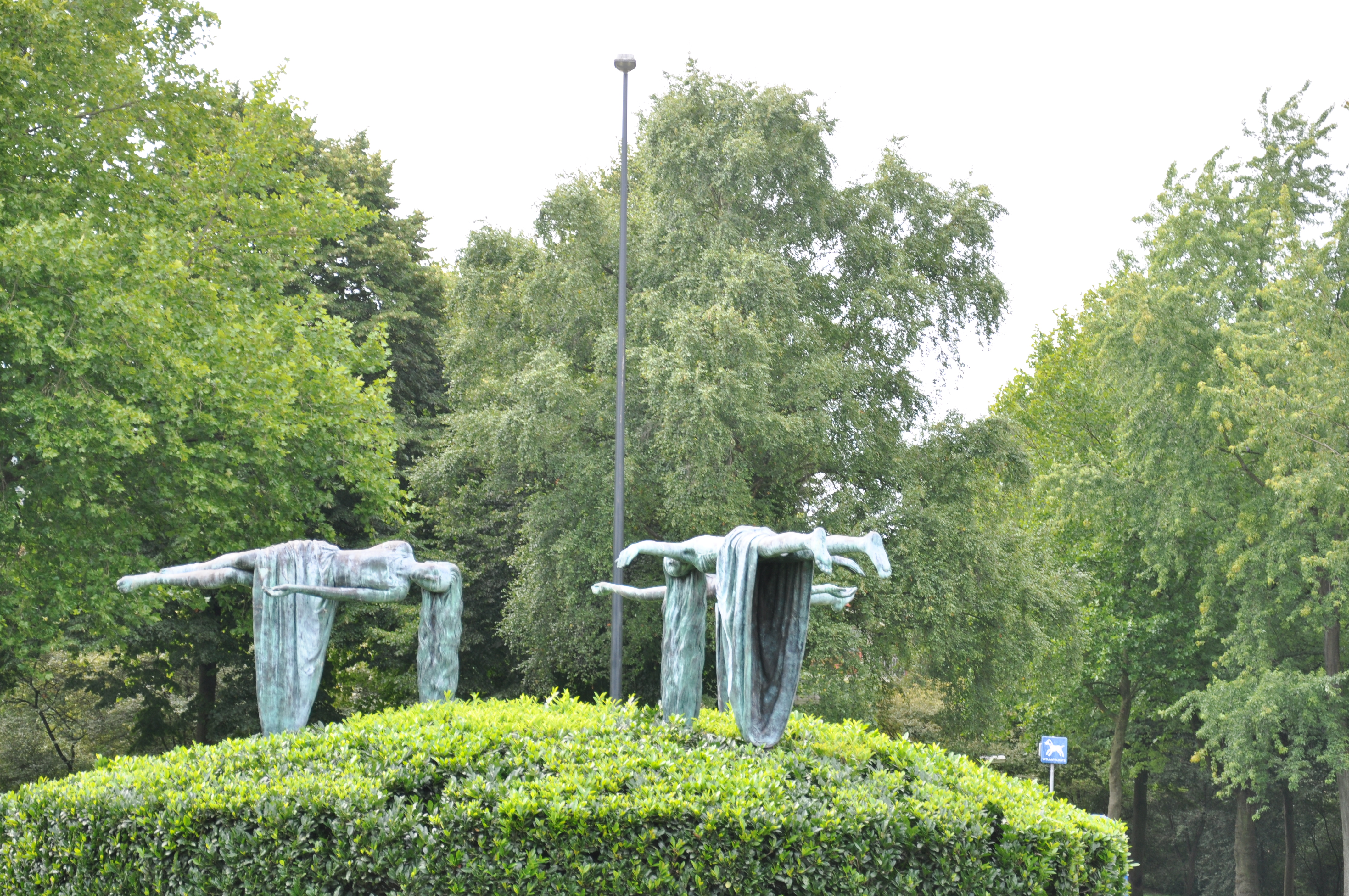 "Zwevende maagden" beeld van Elisabet Stienstra, bij rotonde Matenpoort ApeldoornUnknown